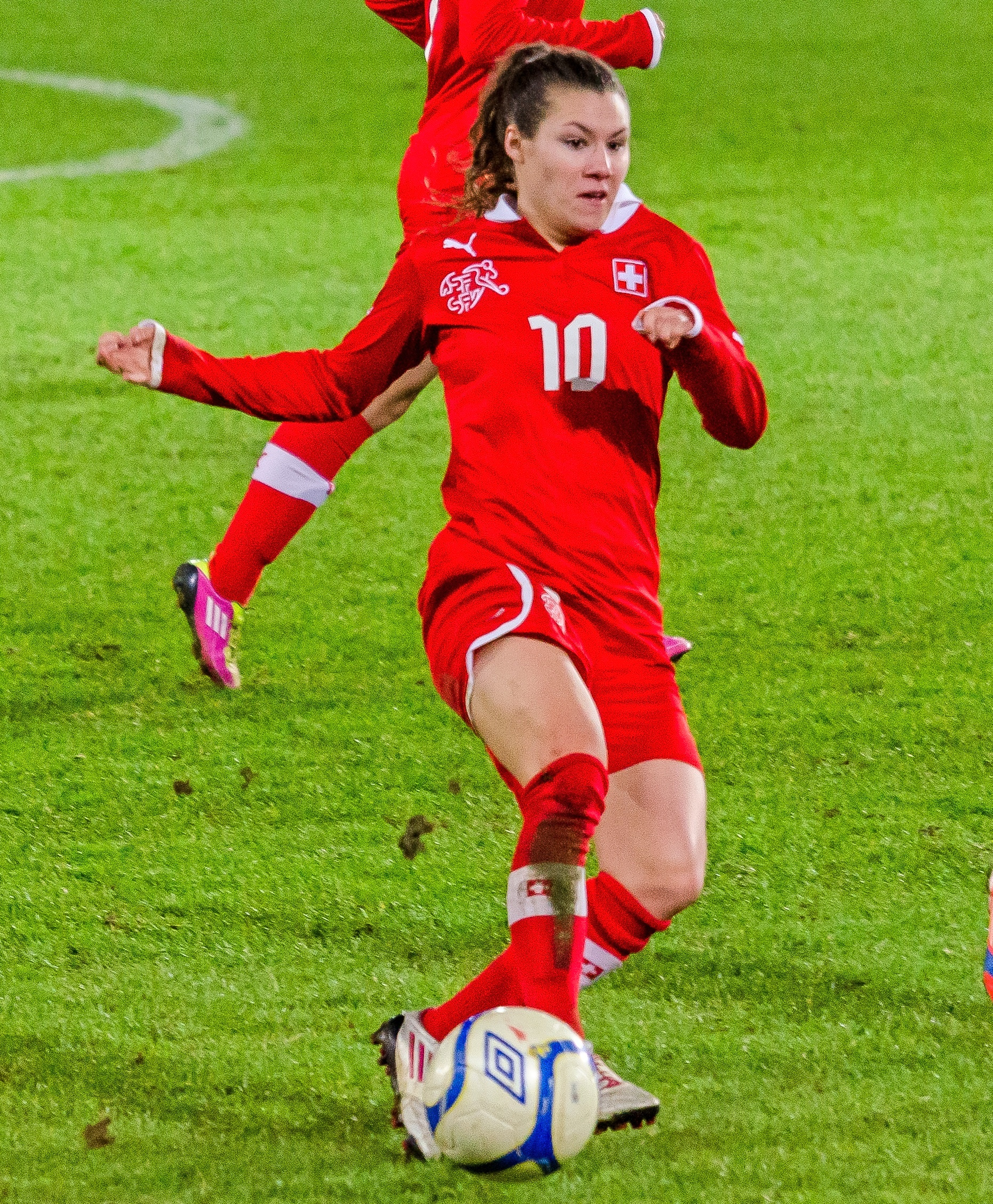 Schweiz anfallare Ramona Bachmann i den första landskampen på Myresjöhus Arena (tillika Pia Sundhages debut som svensk förbundskapten) 23 oktober 2012, där Sverige slog Schweiz med 3-0 inför 4905 åskådare.